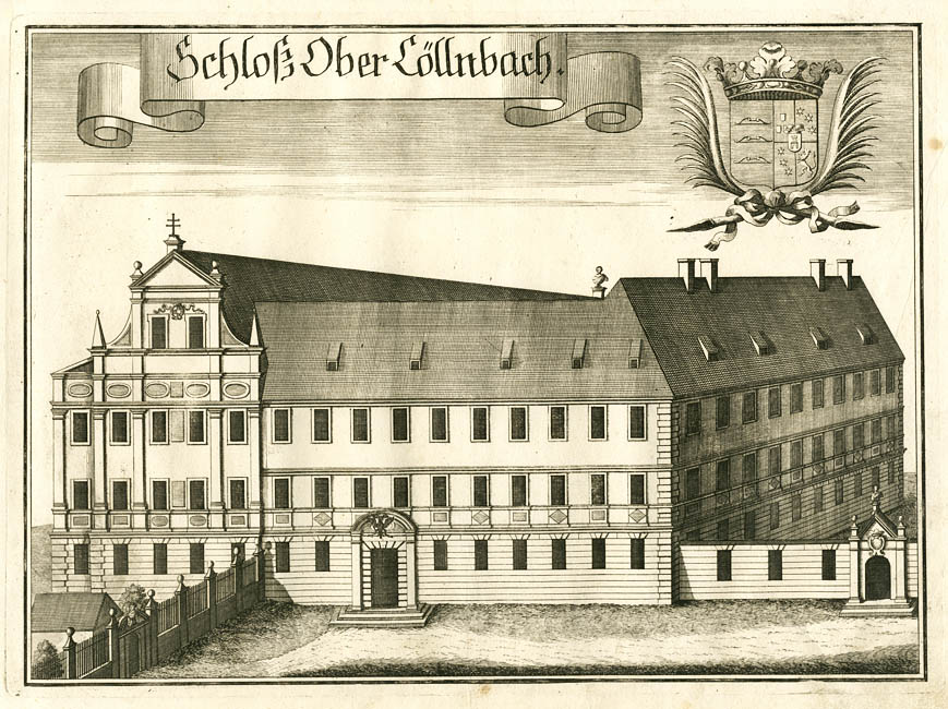 “Schloß Ober Cöllnbach” (Schloß Oberköllnbach, Postau), aus: Beschreibung des Churfürsten- u. Hertzogthumbs Ober- und Nidern Bayrn. Rentamt Landshut. Gericht Rottenburg, 1723